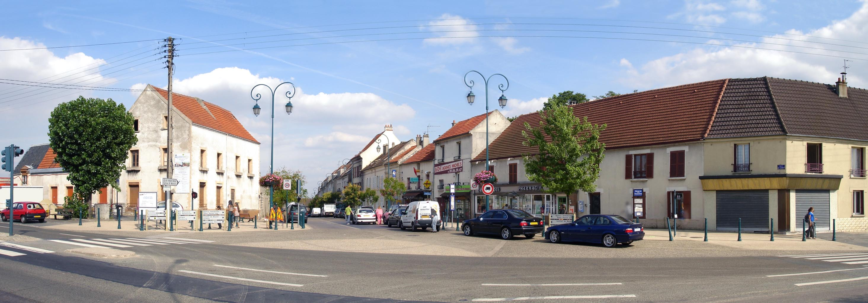 Panoramique de la rue de Verdun, Vieux-Pays, à Garges-lès-Gonesse (Val-d'Oise), France